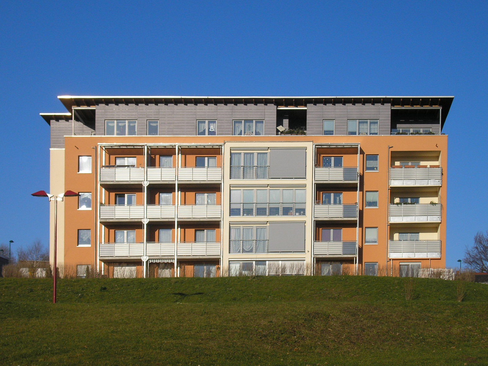 Zurückgebauter Plattenbau auf der Pörlitzer Höhe, Ilmenau, Thüringen